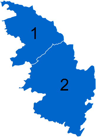 Résultats des élections législatives de la Corse-du-Sud en 2012